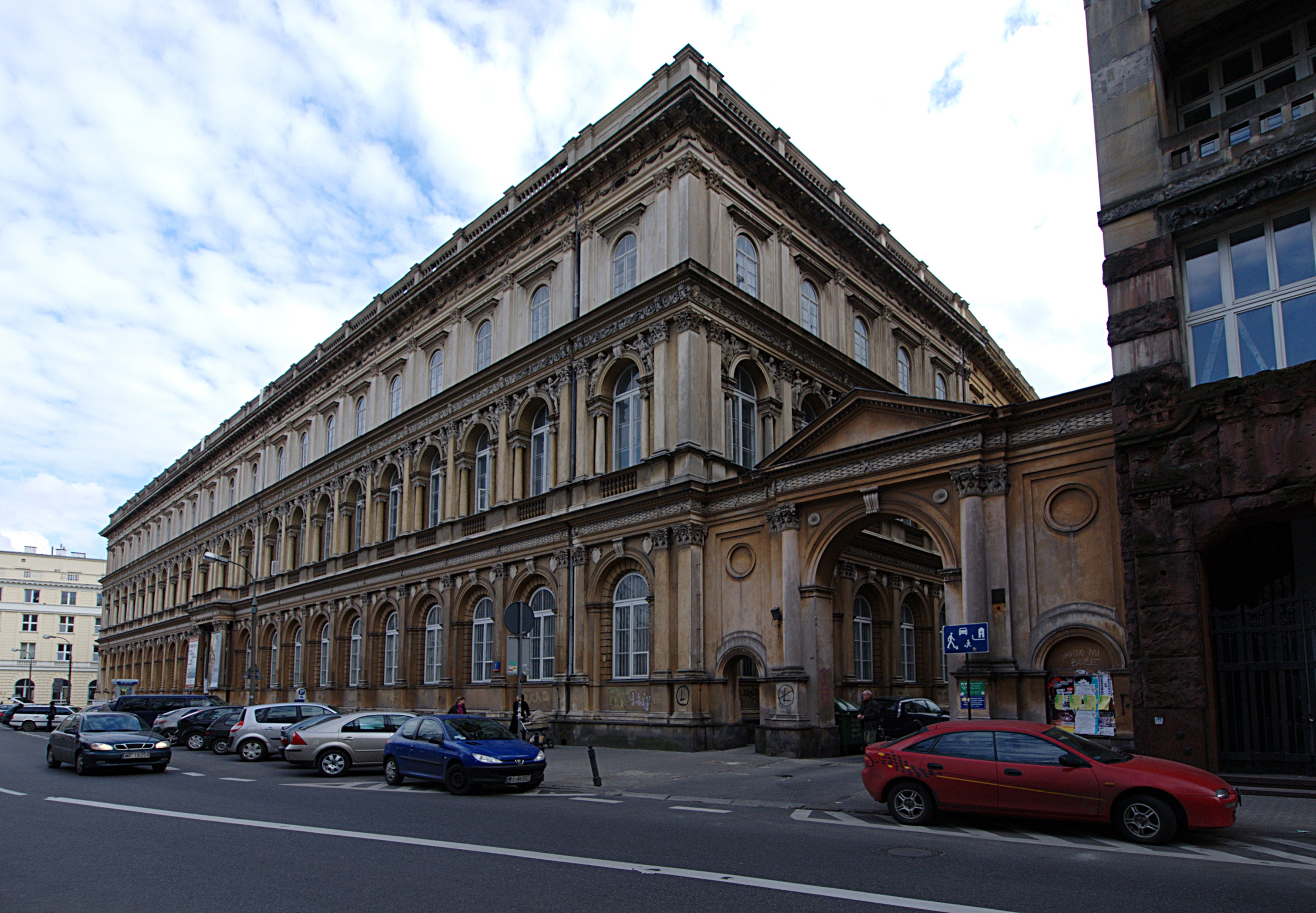 Państwowe Muzeum Etnograficzne. Ulica Kredytowa 1